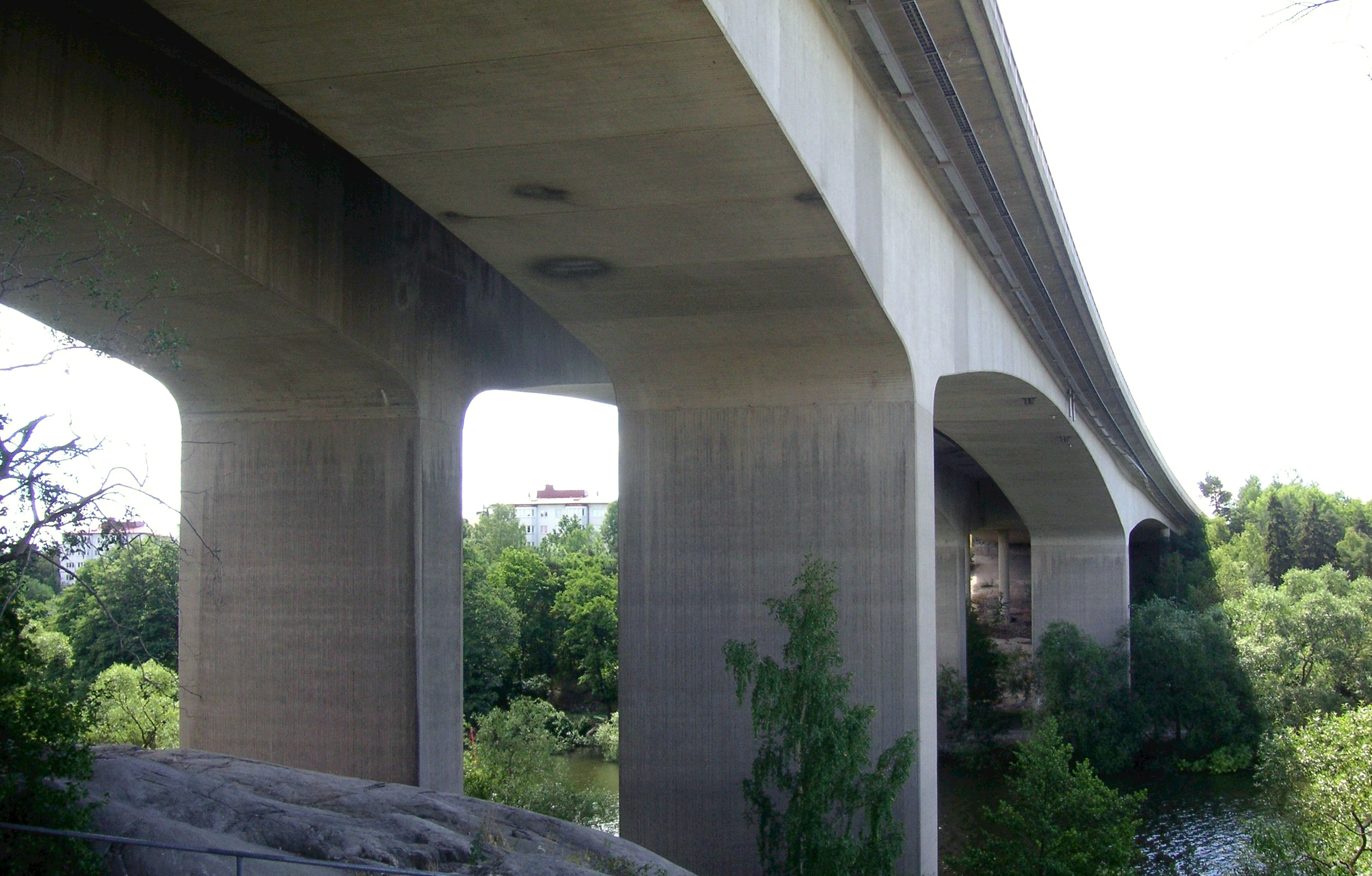 Huvudstabron i Solna